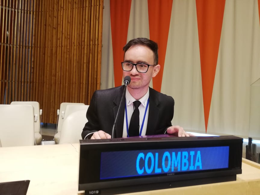 Cardona, Conferencia en la ONU,Nueva, York 2019